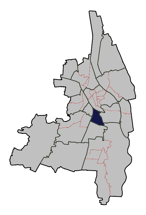 Planungsraum Augsburg-Hochfeld